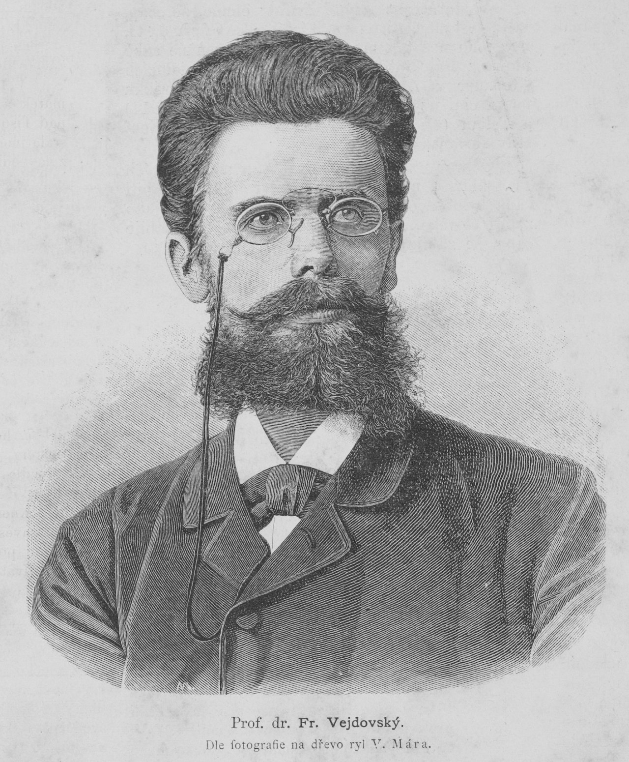 Portrait of František Vejdovský (1849-1939), Czech zoologist.